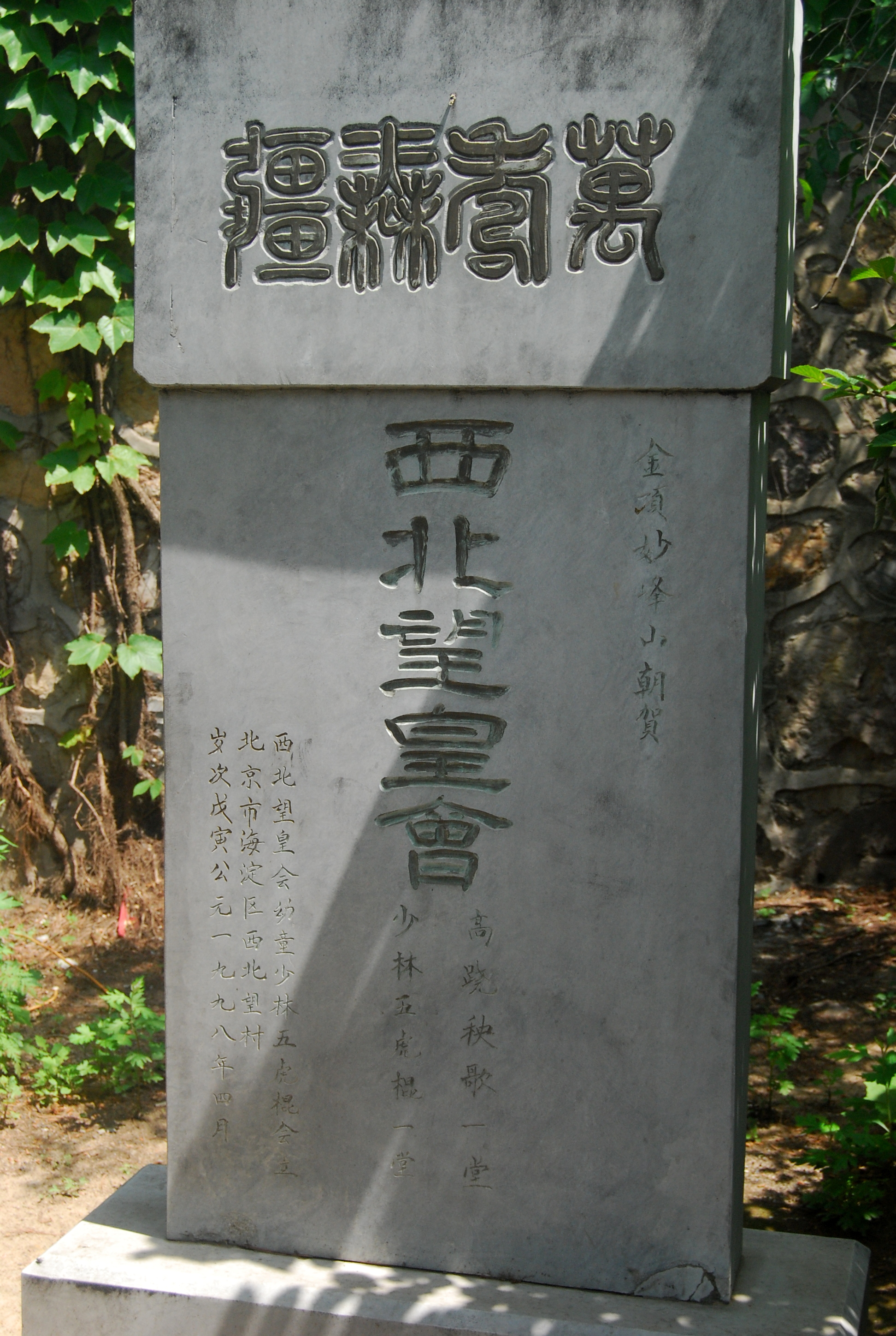 北京妙峰山西北望皇会碑